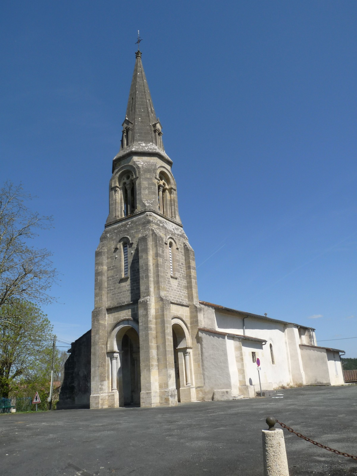 Eglise de Chamadelle, Gironde, France